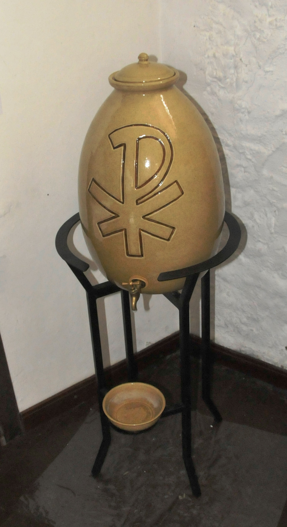 Auw an der Kyll, Mariä-Himmelfahrt-Kirche, Augenwasser-Fass